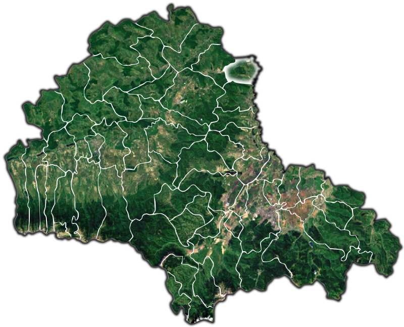 Ormenis jud Brasov